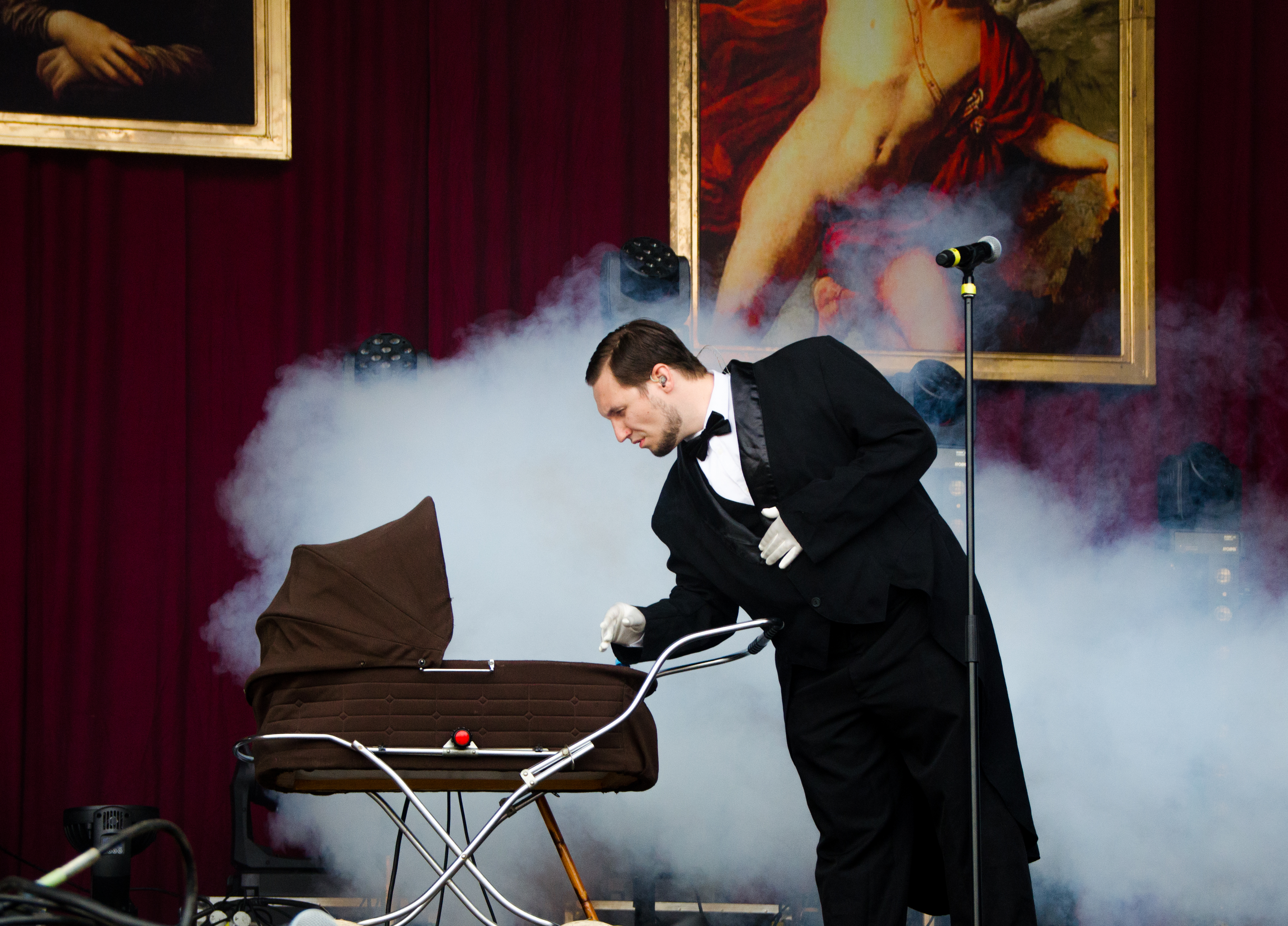 Assistent von Alligatoah auf dem Kosmonaut Festival 2014 in Chemnitz Oberrabenstein. Auftritt Hauptbühne am Freitag, 27.06.2014.